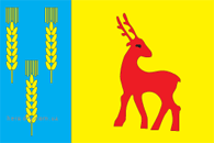 Прапор Козівського району